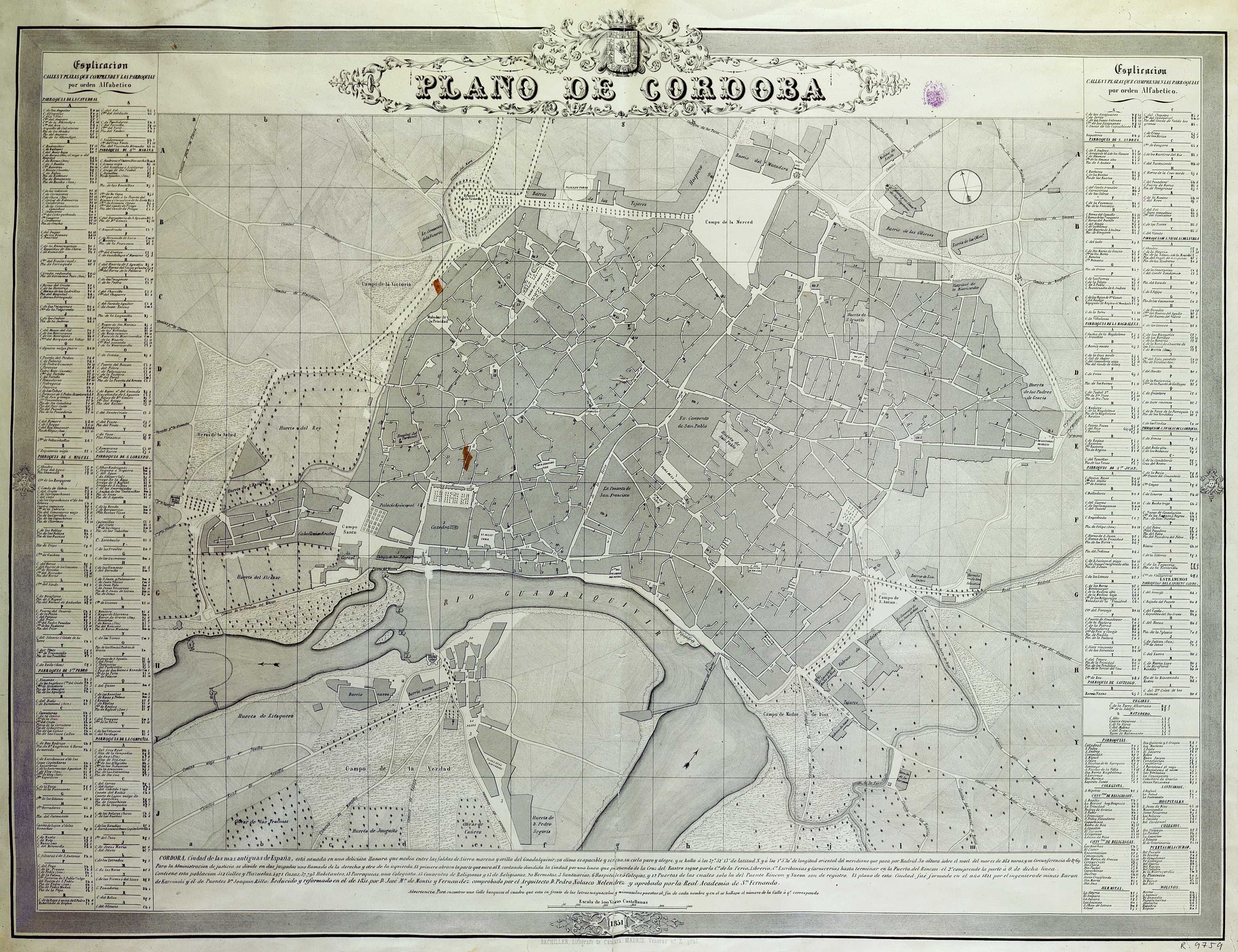 El título coronado por un escudo En los márgenes laterales nomenclátor. Orientado con flecha con el N. al NO. del plano.- Cultivos y arbolado representados